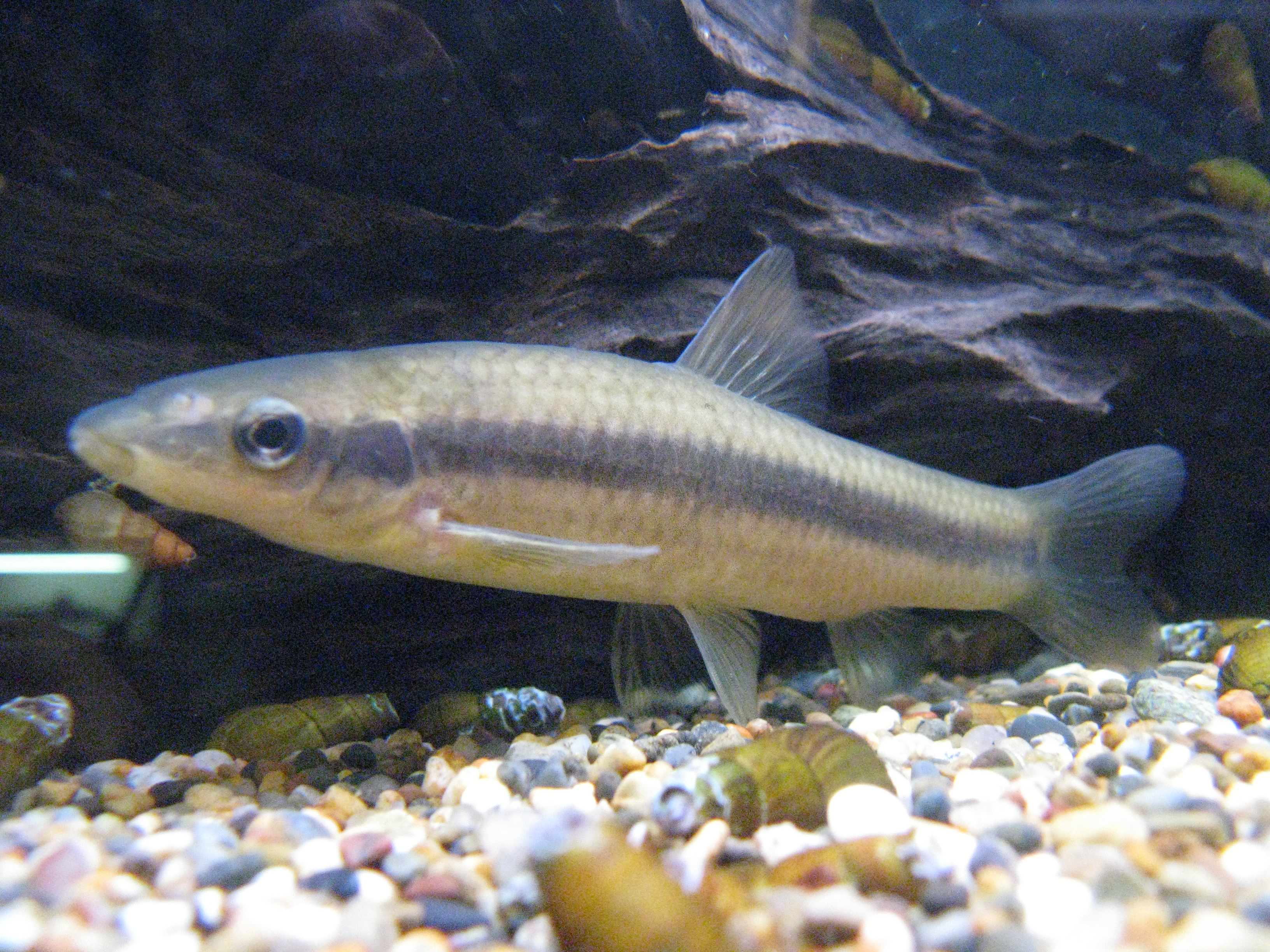 Scientific name Pungtungia herzi